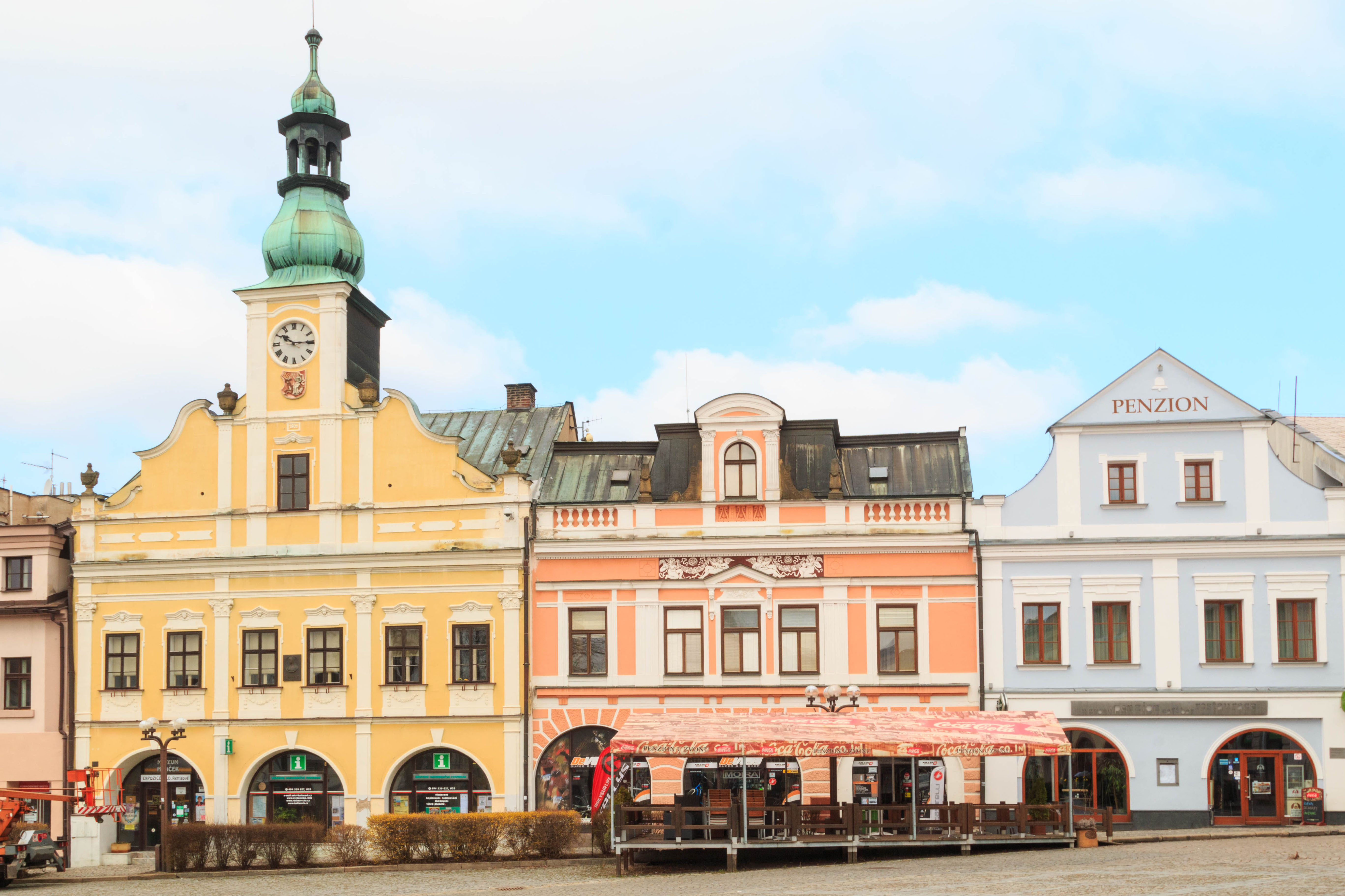 Radnice, Staré náměstí 68, Rychnov nad Kněžnou.